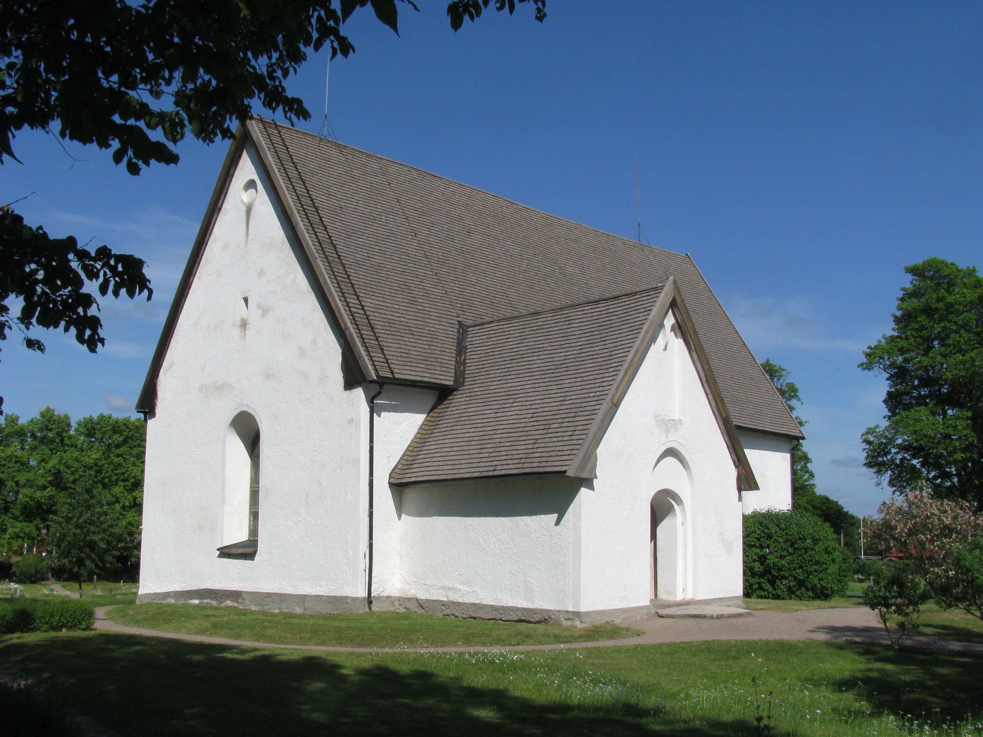 Östuna kyrka